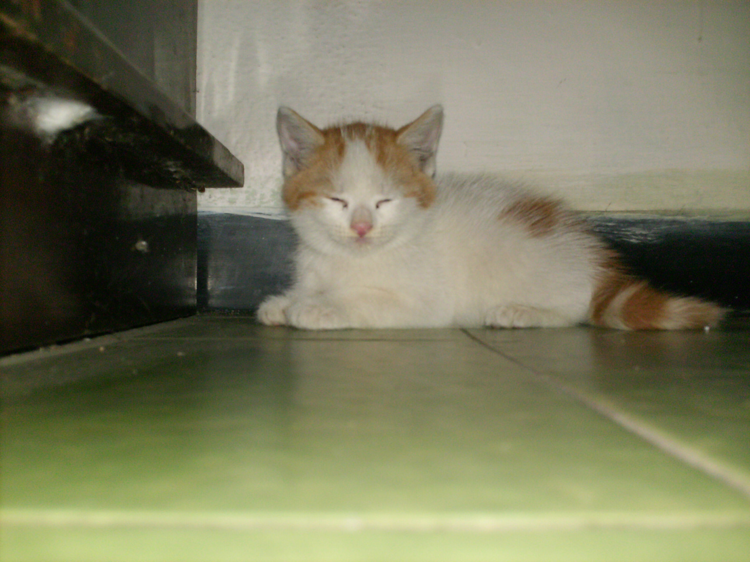 Gato van turco o variante angora de un mes